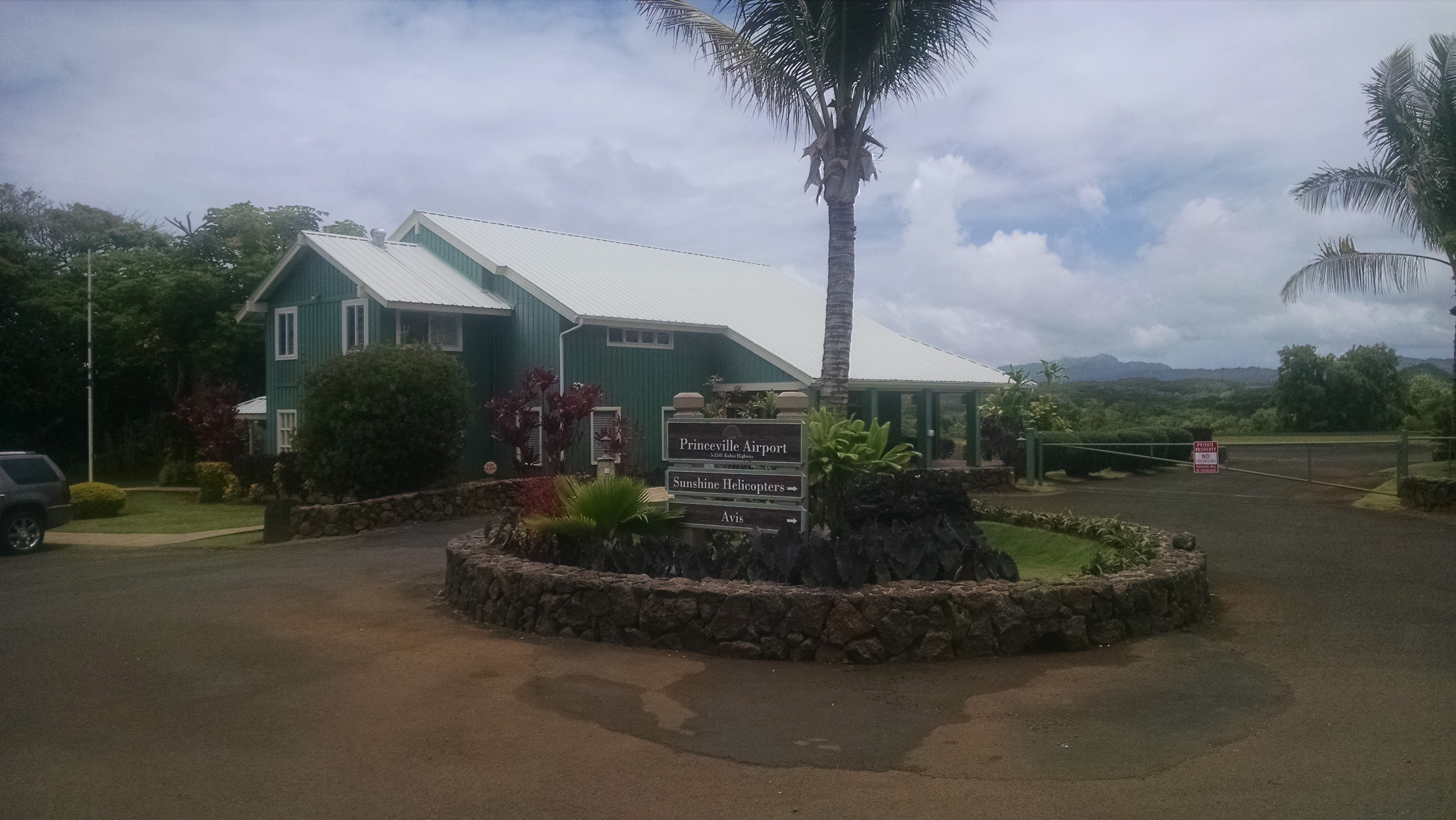 Entrance sign